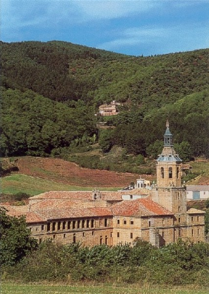 Date du cliché : septembre 2001.